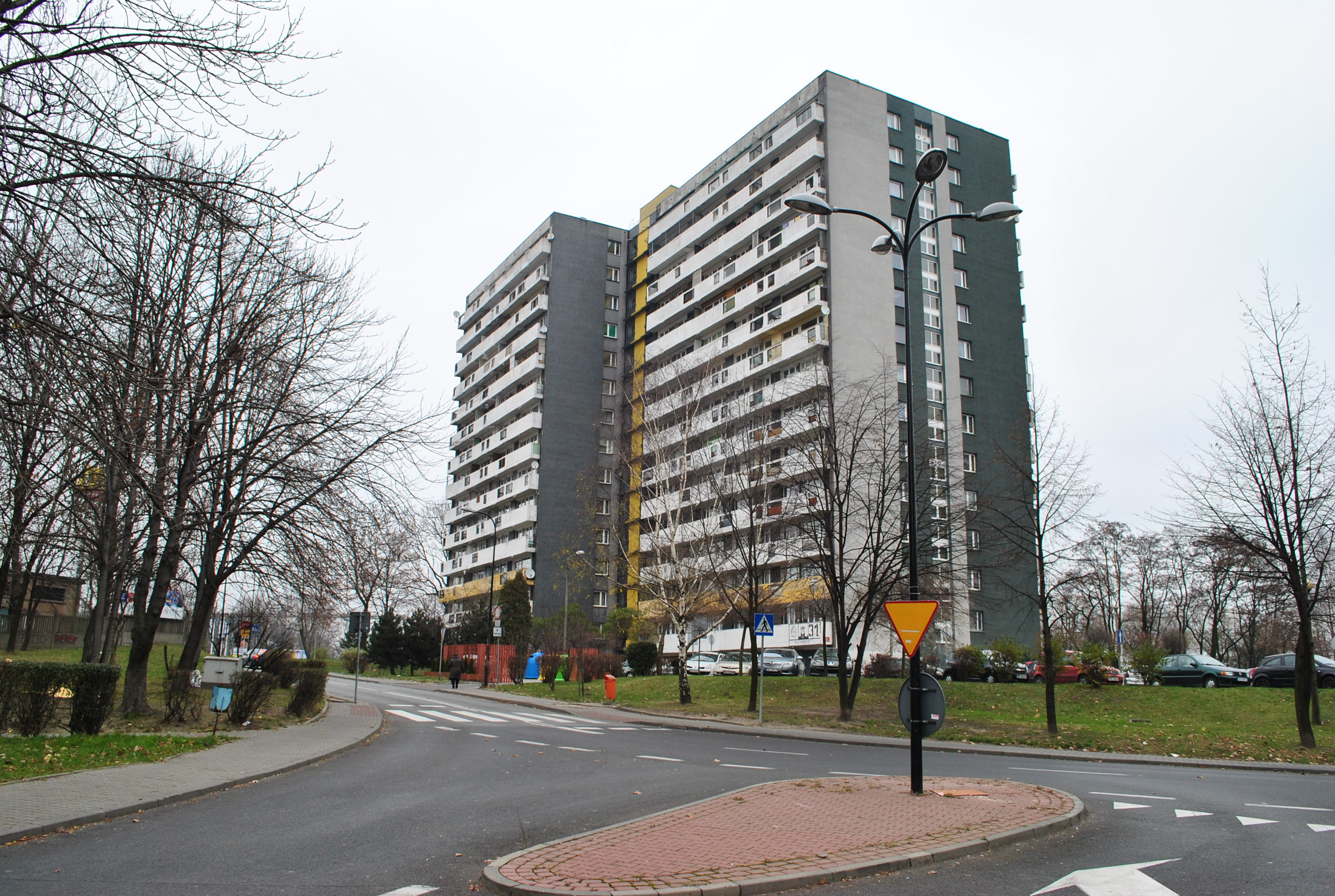 Katowice, Osiedle Tysiąclecia. Blok przy ul. Chrobrego 31